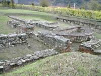 Scavi archeologici della antica città etrusco romana di Mevaniola